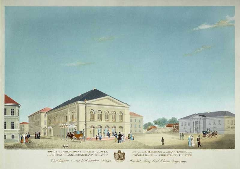 Christiania i Aar 1838, mennesker i bymiljø: Bankplassen med Christiania Theater. FarvelitografiDepicted place: Christiania Theatre